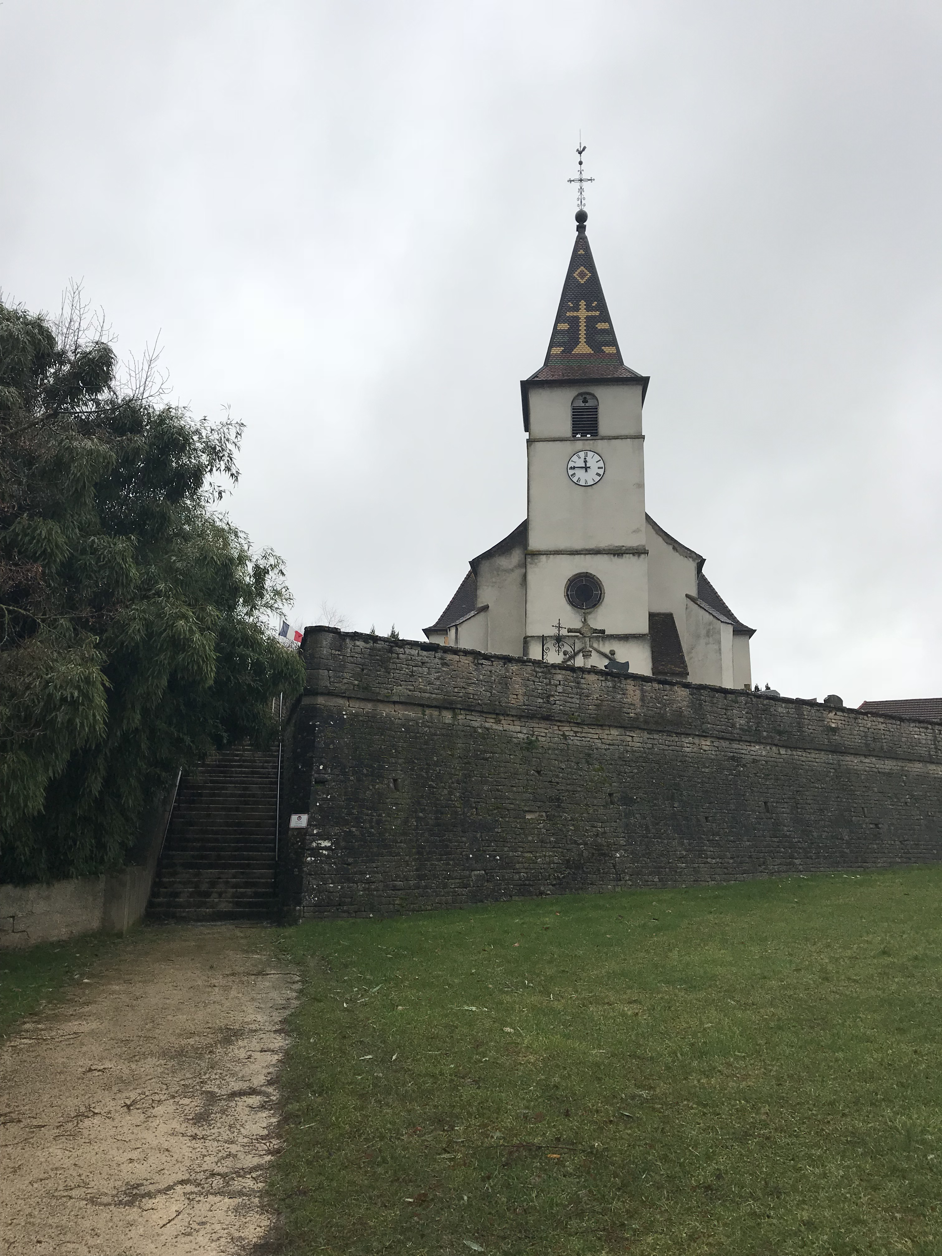 Sermange (Jura, France) en janvier 2018.